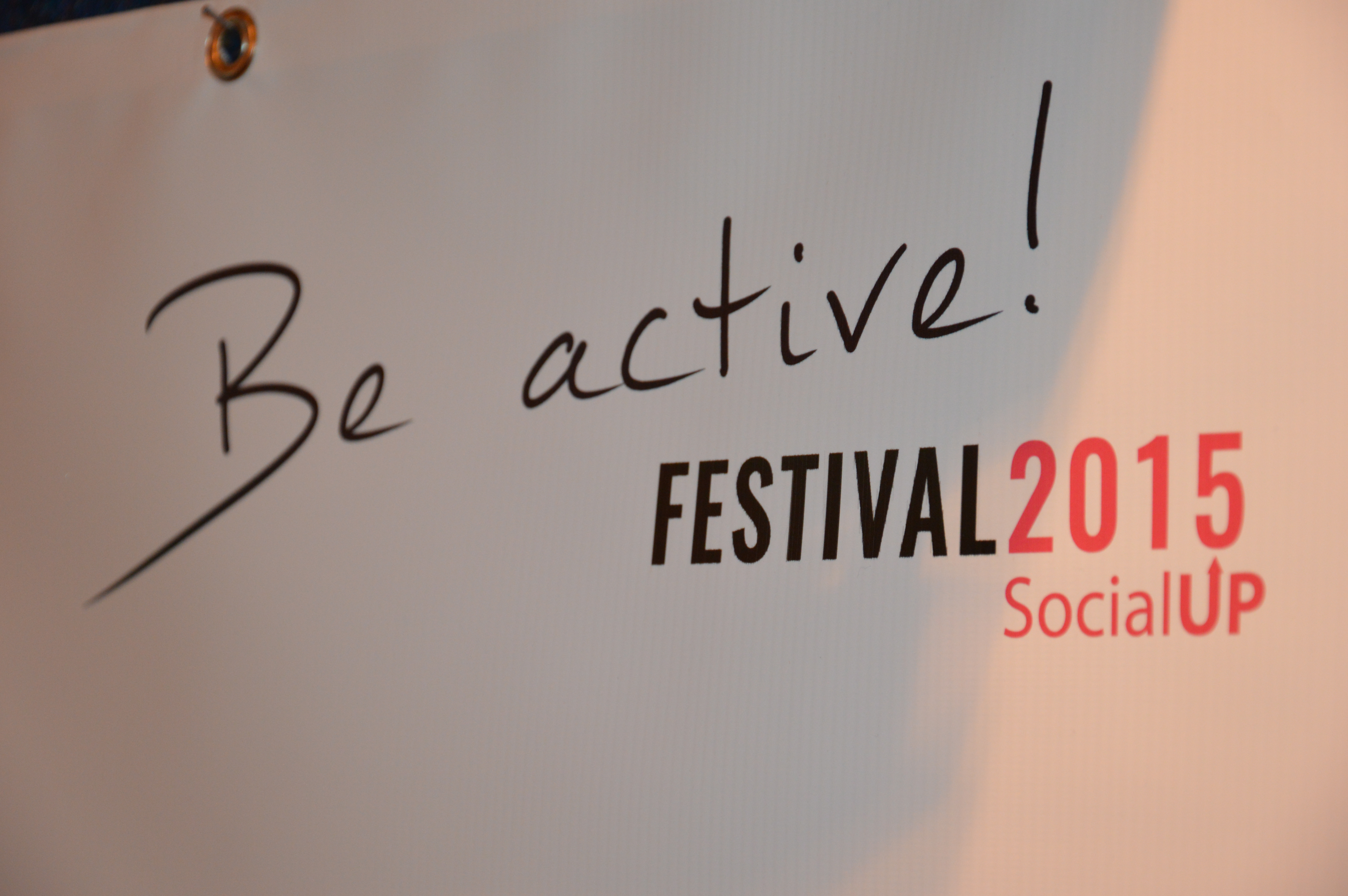 Festival Be Active, festival ktorý mladým ľuďom v Poprade každoročne ukazuje, že dokážu všetko